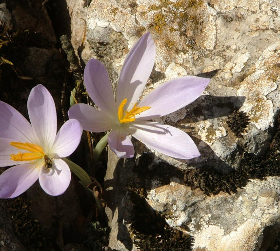 El Torcal Herbst-Krokus (Crocus serotinus subsp. salzmannii)